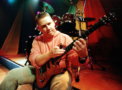 Pressefoto Dirk Edelhoff